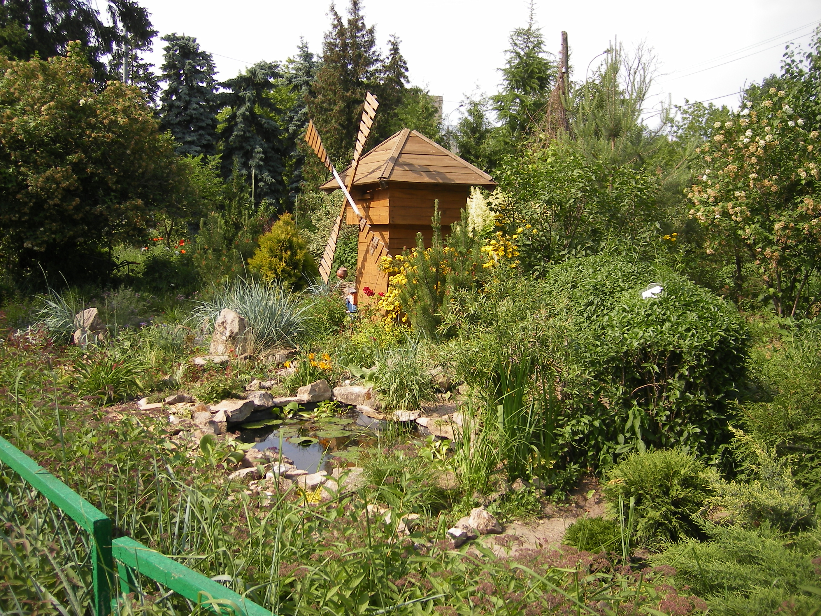 Near entrance / При входе